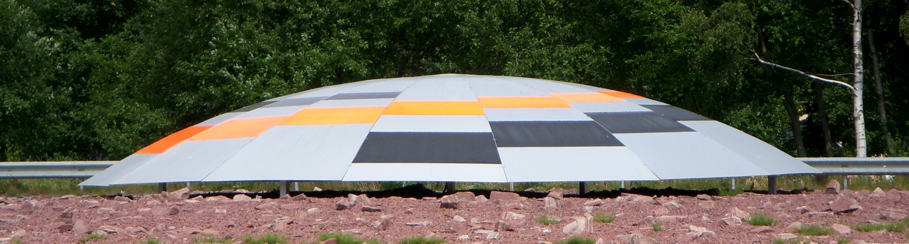 "Lysande tefat" konstverk av Maria Ängquist-Klyvare på rondell i Huddinge